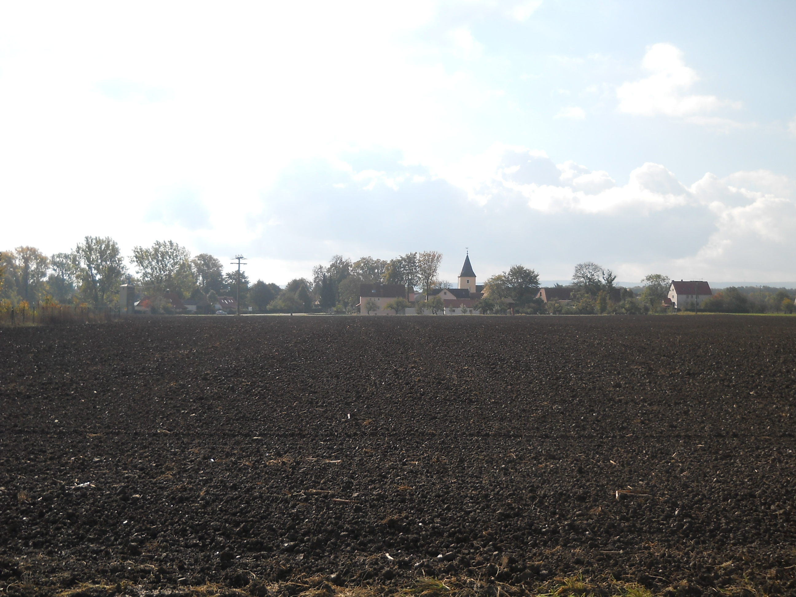 Frickenfelden, Ortsteil von Gunzenhausen im mittelfränkischen Landkreis Weißenburg-Gunzenhausen (Bayern)